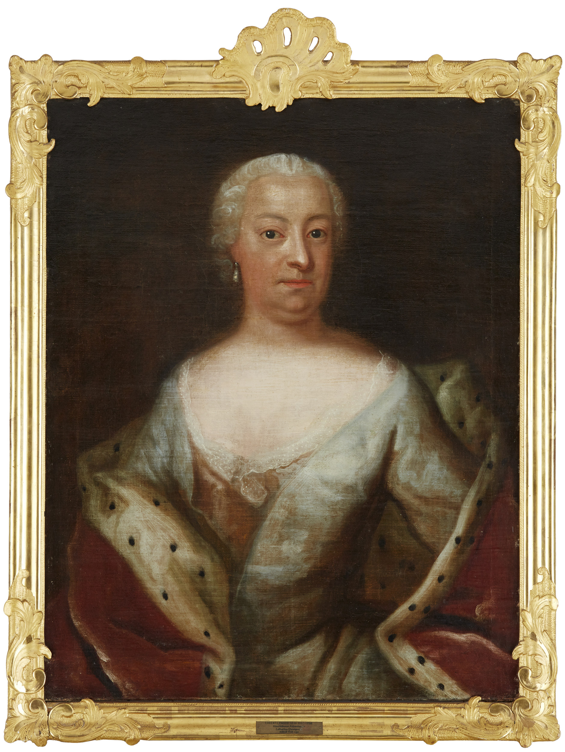 Porträtt av friherrinnan Catharina Ehrenpreus (1692-1775), född Lindroth klädd i ljusgrå klänning och hermelinbrämad mantel - midjebild. Hon var gift med riksrådet friherre Carl Diedric Ehrenpreus (1692-1760) Avporträtterad 1748 av Lorens Pasch d.ä.. Signerad och daterad på baksidan Lorentz Pasch 1748. Olja på duk, 80 x 64 cm. Baksidan med samtida påskrift: "Friherrinnan ock Riksrådinnan frü Catarina Ehrenpreus, född Lindroth, måhlat åhr 1748" Samtida förgylld och bronserad ram i rokoko Registrerad i Svenska Porträttarkivet, SPA 1920:819 Proveniens: Godsägare Jonas Kjellberg, Frielsberg, Västergötland